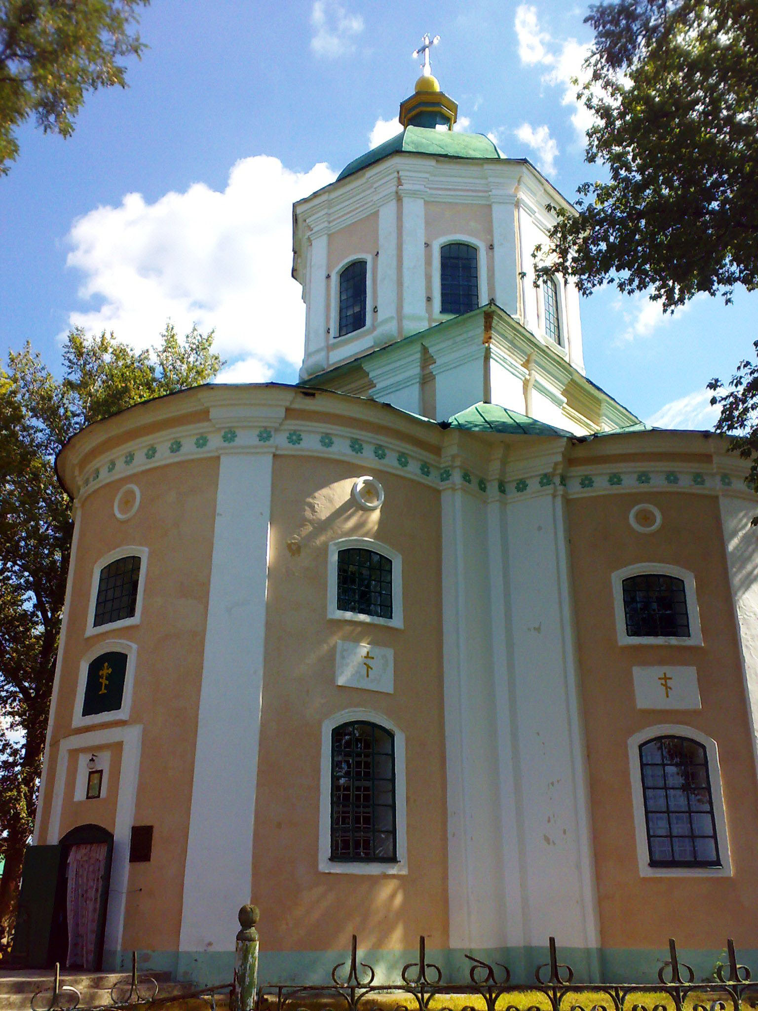 Свято-Іллінська церква в Новомиргороді (Кіровоградська область, Україна)